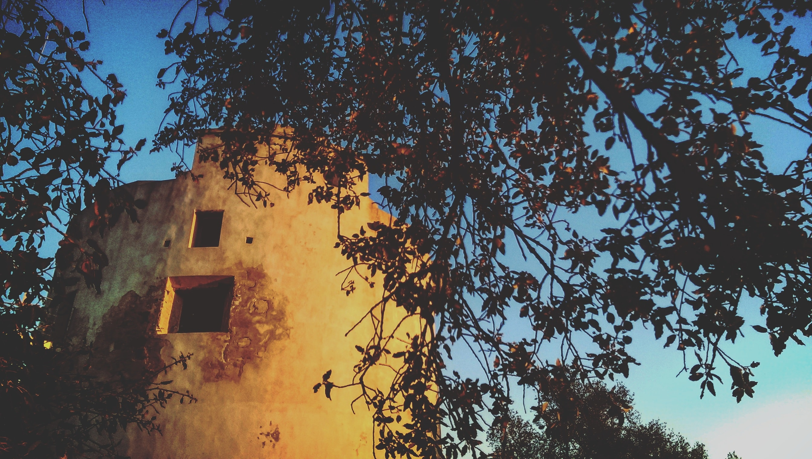 Baluarte San Felipe, Encinasola, construido en 1645 con mampostería de piedras de aristas vivas tomadas con mortero de cal e hiladas de ladrillo.